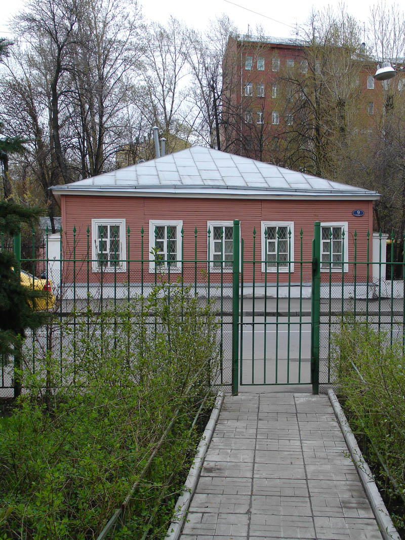 Malaya Ordynka Street, Moscow, view from St.Nicholas church gardenУлица Малая Ордынка в Москве. Вид из сада церкви Николы в Пыжах